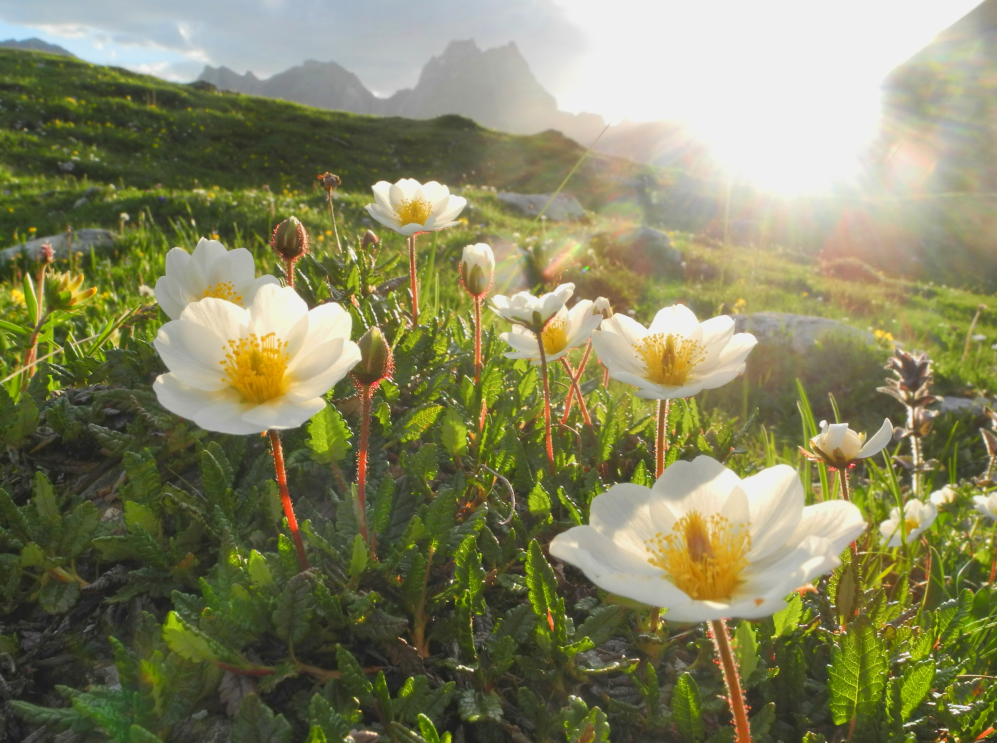 Blumenwiese an der Kemptener Hütte